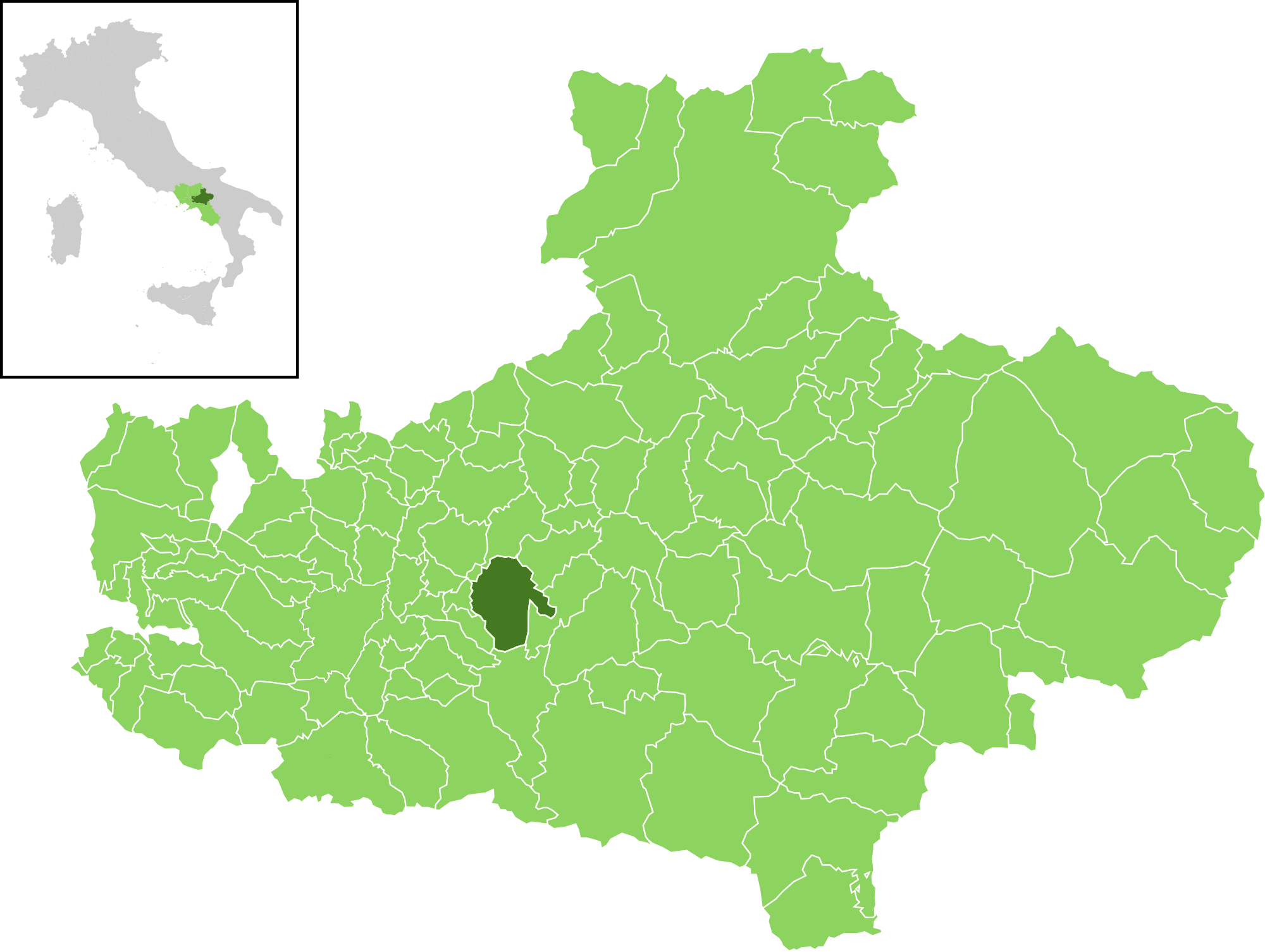 Il comune all'interno della provincia di Avellino